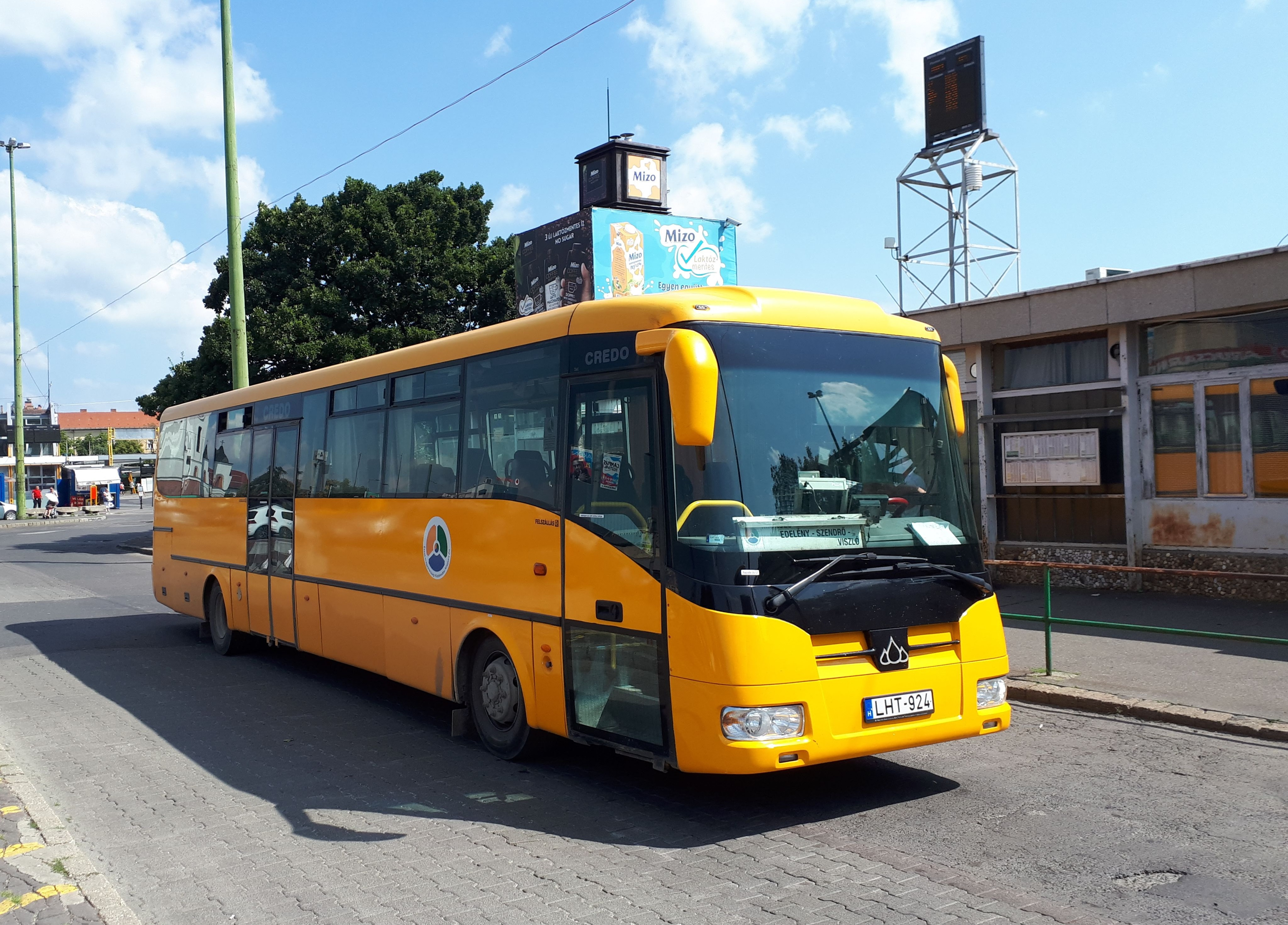 Az ÉMKK LHT-924 rendszámú Credo EC 12 típusú busza Miskolcon, a 3708-as helyközi járaton.